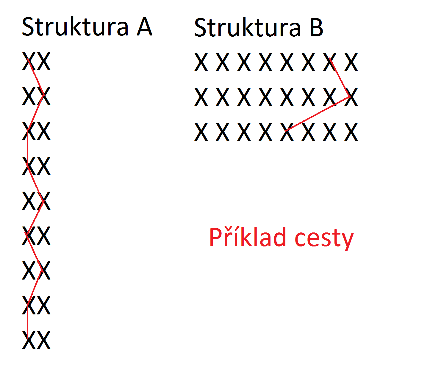 Vizualizace dotázníkového experimentu studujícího jednoduchost představování si logických operací